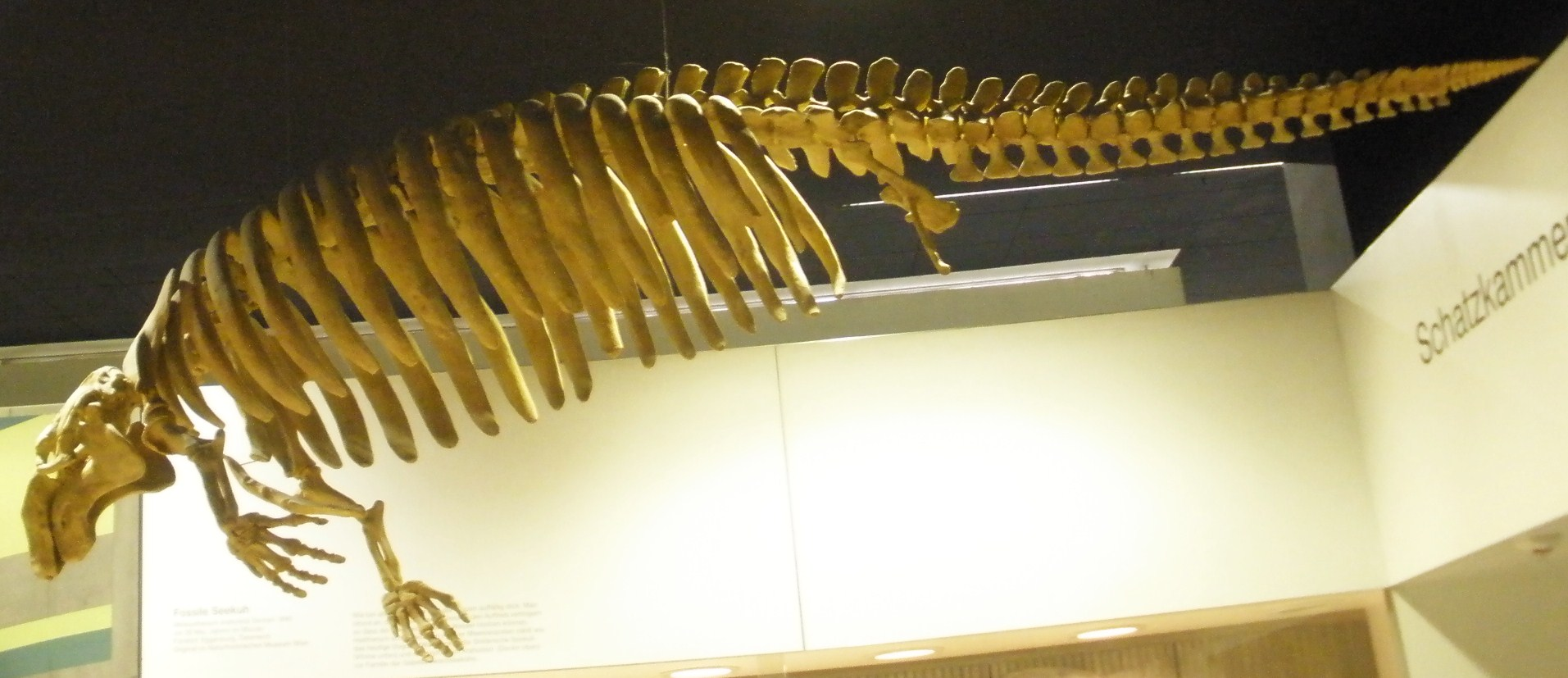 Fossil of Metaxytherium, an extinct sirenian- Took the photo at Senckenberg Museum of Frankfurt